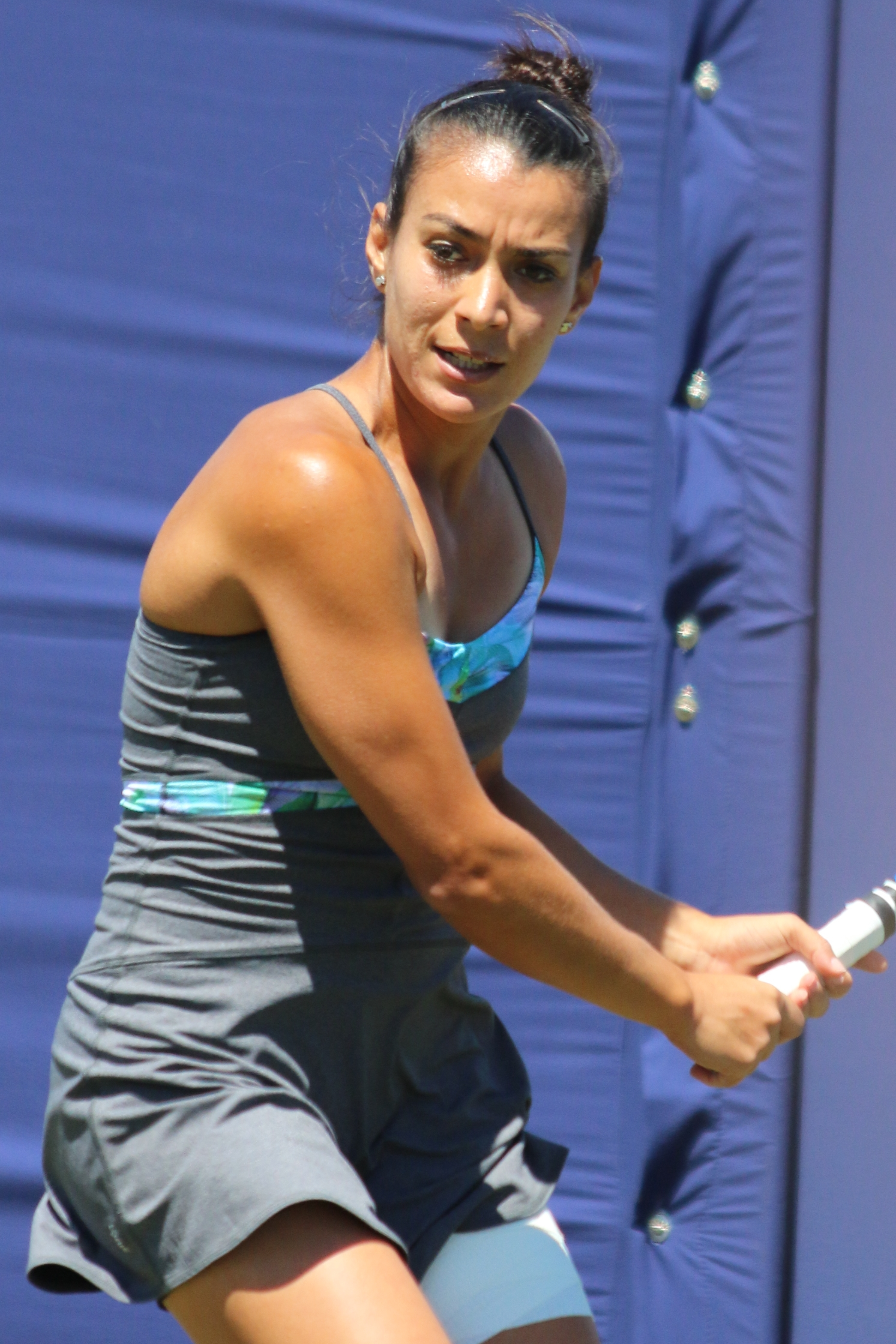 Cepede Royg EBN17 (9)